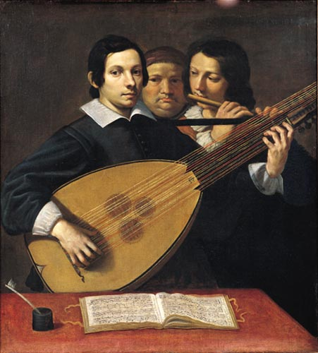 Ritratto del liutista Girolamo Valeriani